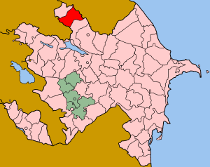 Map of Azerbaijan showing Zaqatala rayon.